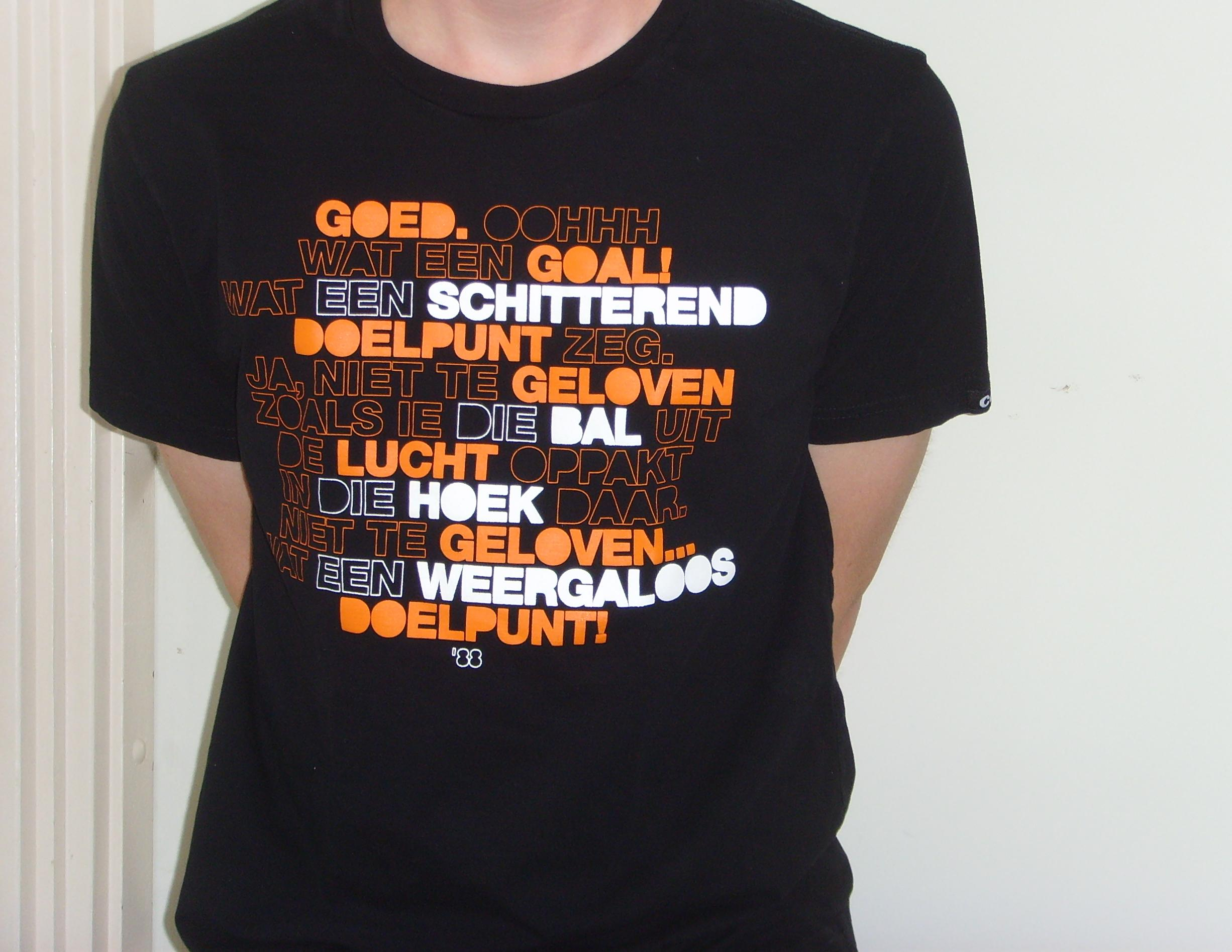 T-shirt met het commentaar tijdens en na het doelpunt van Marco van Basten in de finale van het EK voetbal 1988 in München.